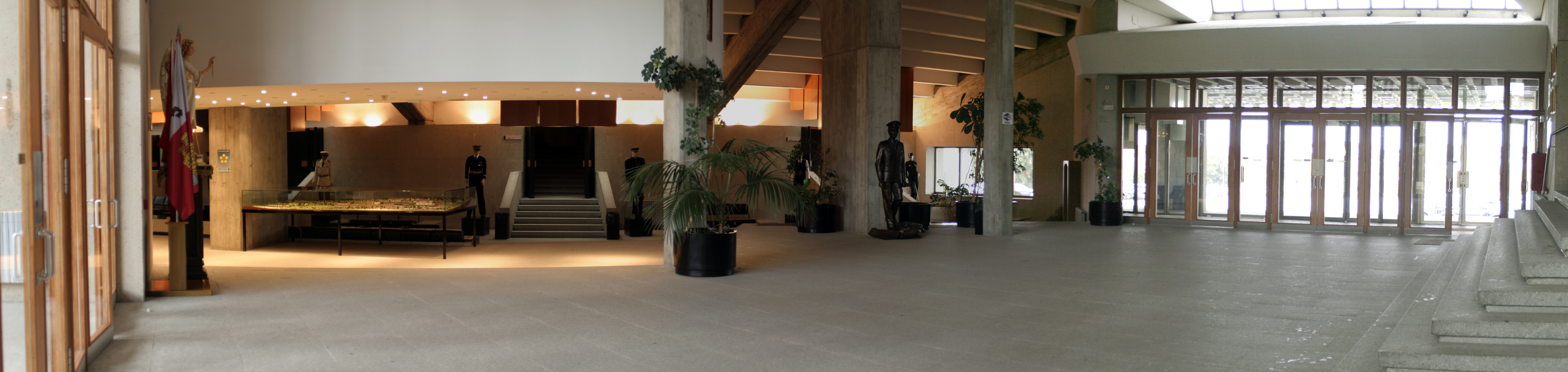 Hall principal